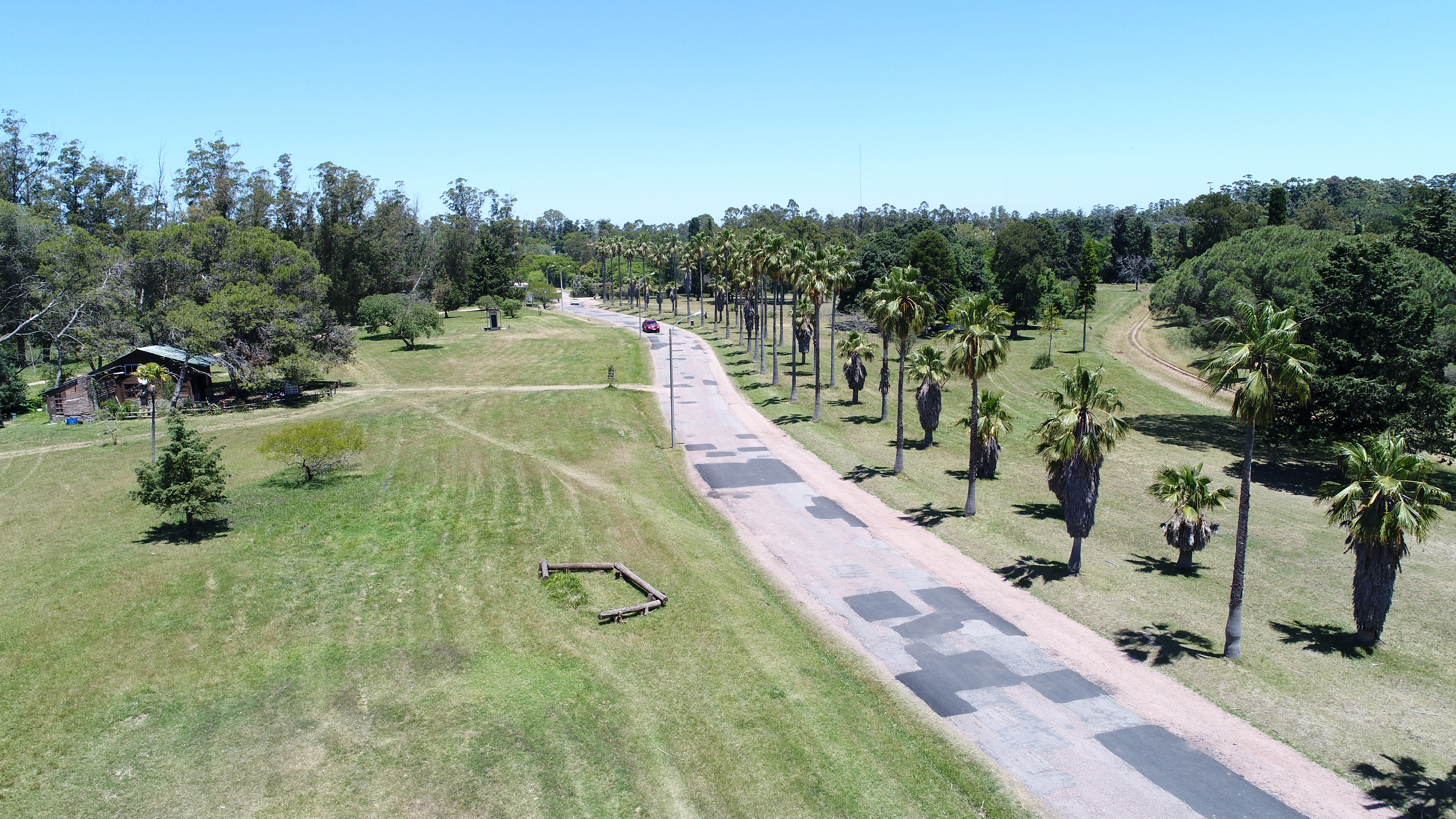 Parque Lecoq, Montevideo, Uruguay, toma aérea.